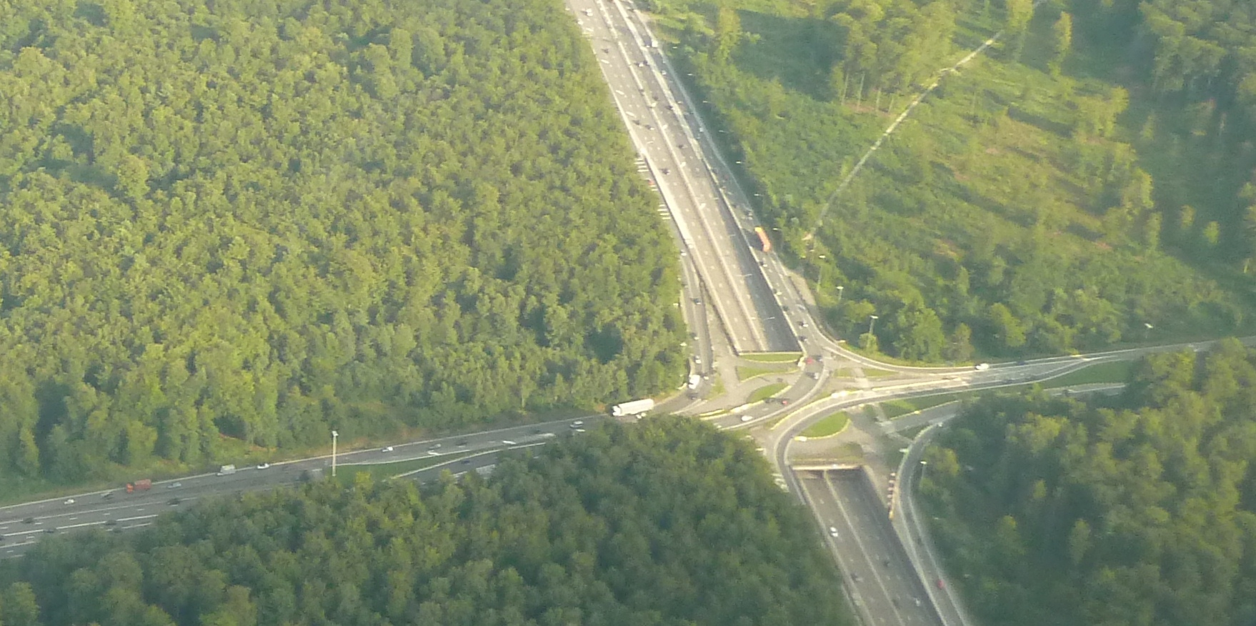 carrefour Leonard